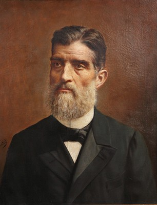 Pintura de Prudente de Morais da Presidência da República Federativa do Brasil.